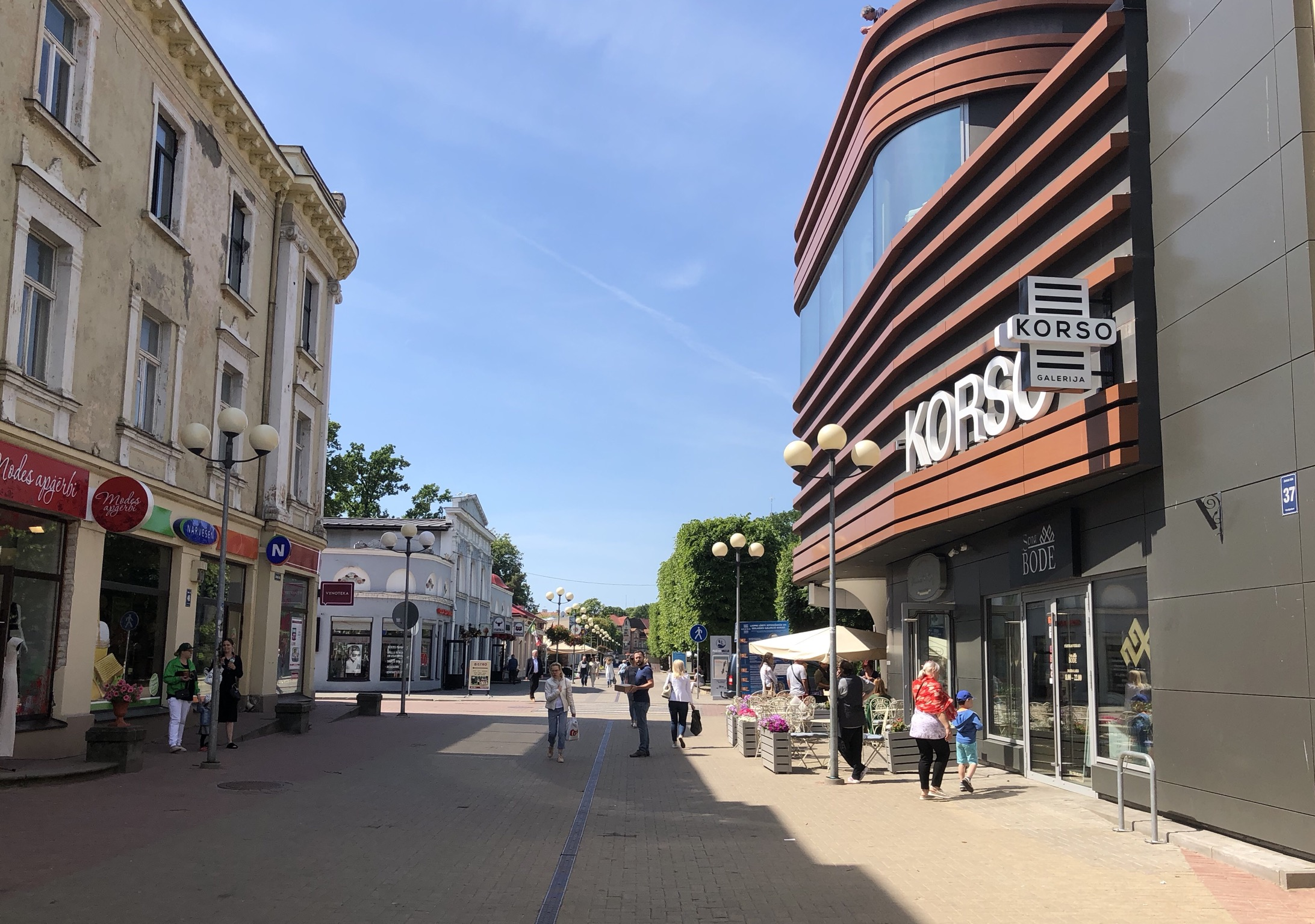 Johmenstraße in Riga 2018